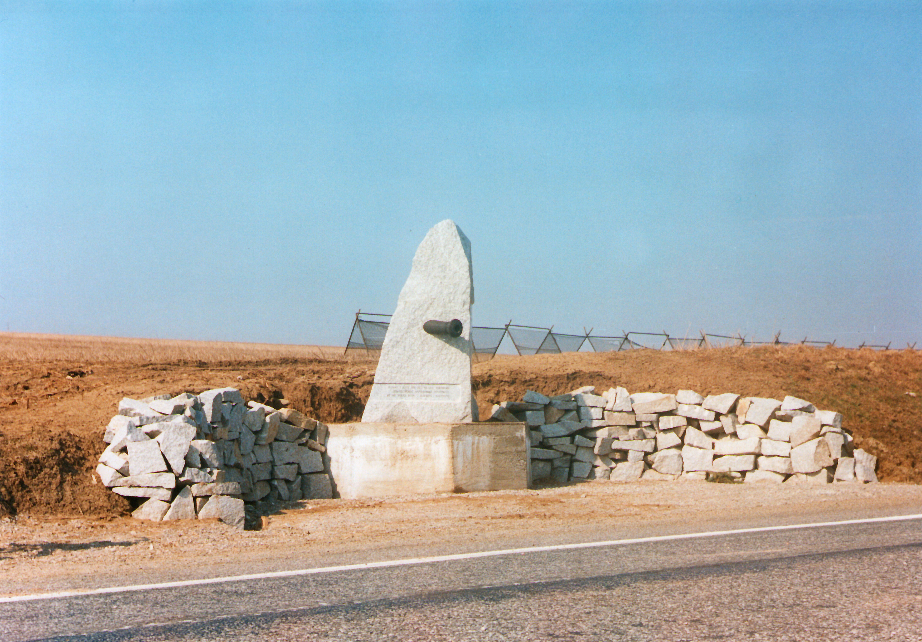 Pomník rakouským dělostřelcům majora Frierenbergera z bitvy u Slavkova, leží nedaleko Staré pozořické pošty, při silnici do Rousínova. Celkový pohled od jihu, stav před finální úpravou, cca v roce 1995.